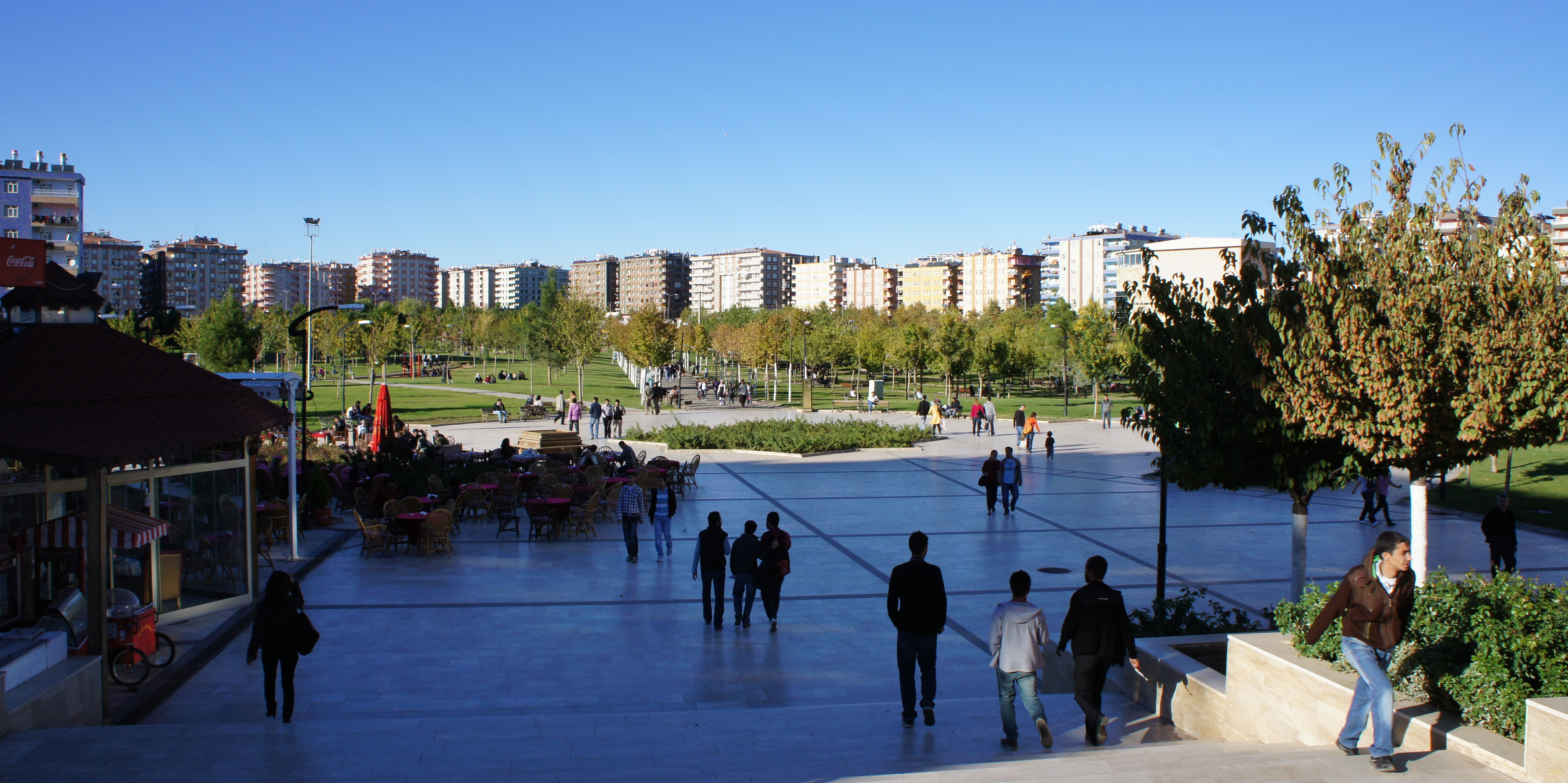 Kurdî: Seyrangeha Parkormanê, Amed.